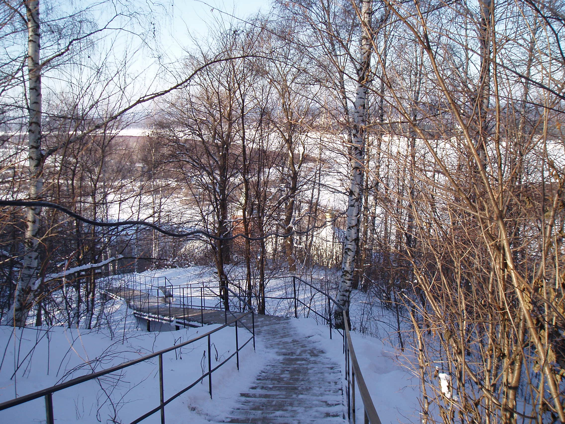 Лестница к Амвросиеву Николаевскому Дудину монастырю